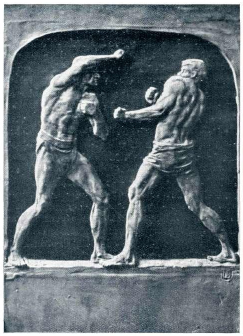 Rokoborca.